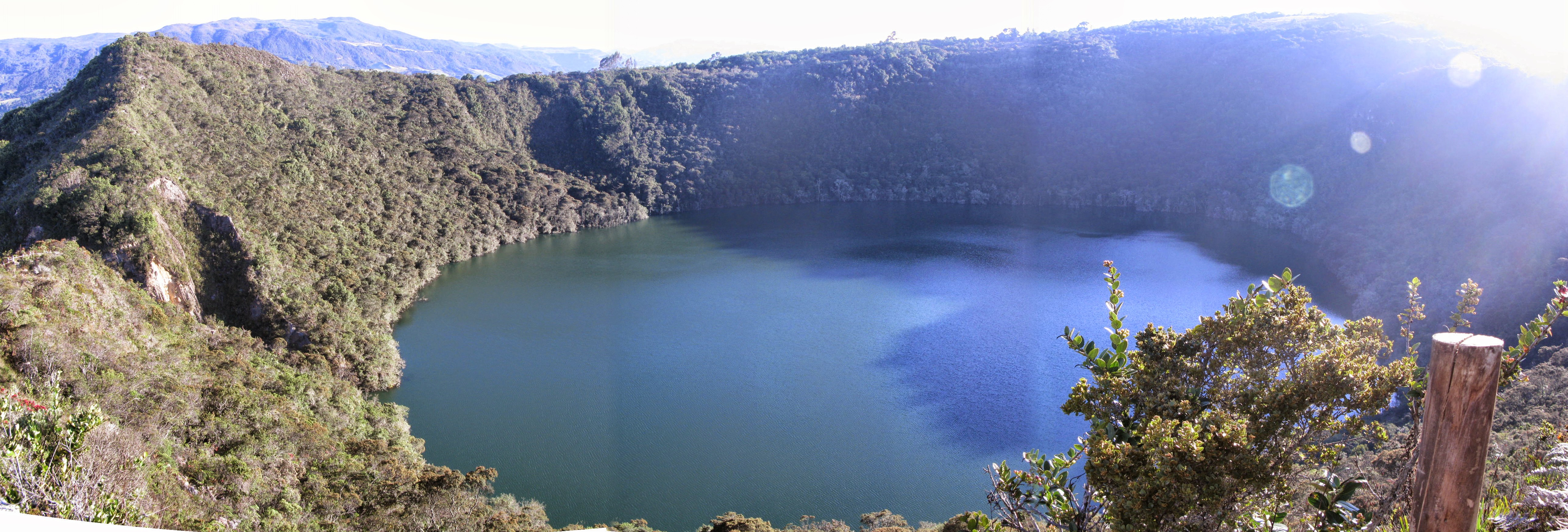 La "gran" pequeña laguna de Guatavita al atardecer en un soleado día.